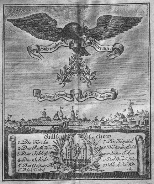 entnommen: Neuzugerichtetes Züllichowisches Gesang- und Gebeth-Buch. 36. Auflage. 1794.